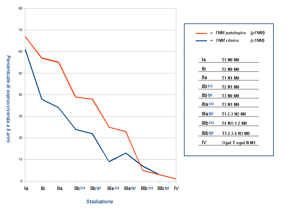 Curve di sopravvivenza percentuale a 5 anni basate sulla stadiazione dei tumori del polmone non a piccole cellule.